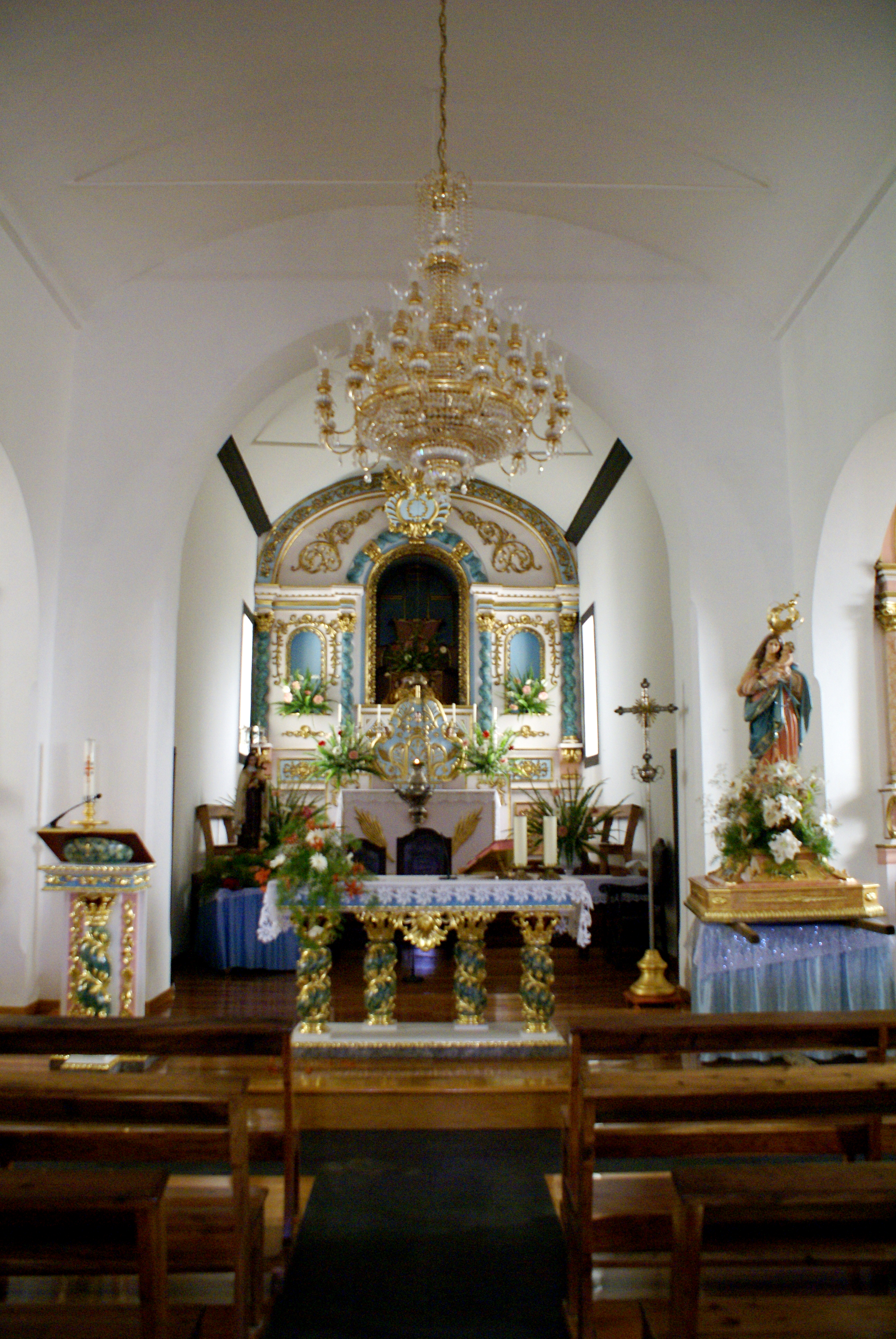 Igreja da Nossa Senhora do Rosário, altar mor, Rosais, Velas, ilha de São Jorge, Açores, Portugal